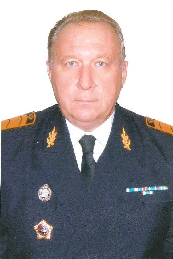 фотография первого руководителя Федерального агентства воздушного транспорта